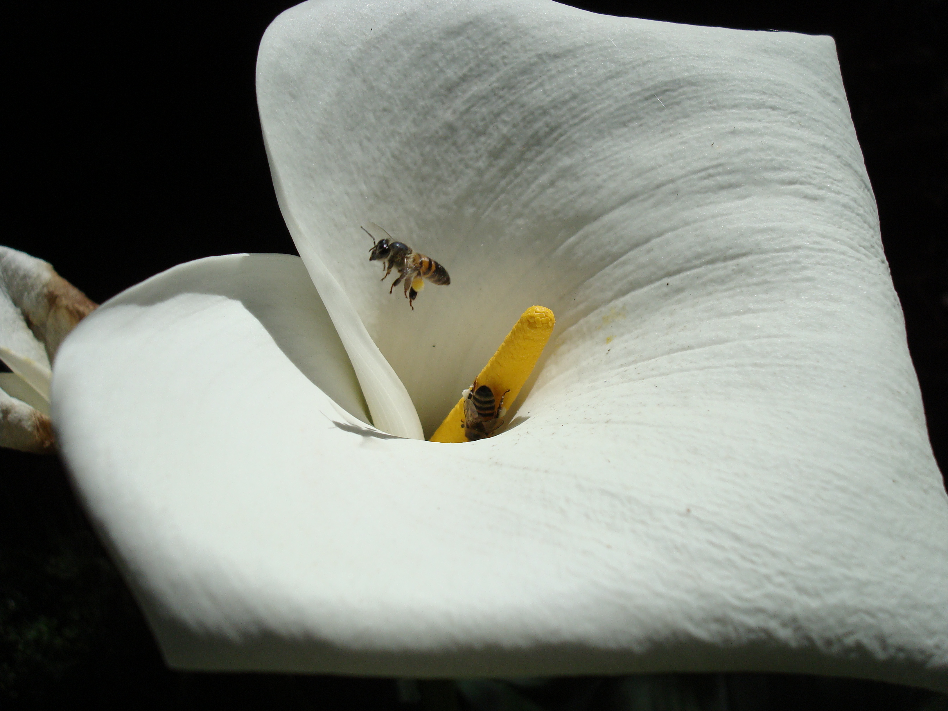 Fotografia da flor Copo de Leite, nome científico Zantedeschia aethiopica.